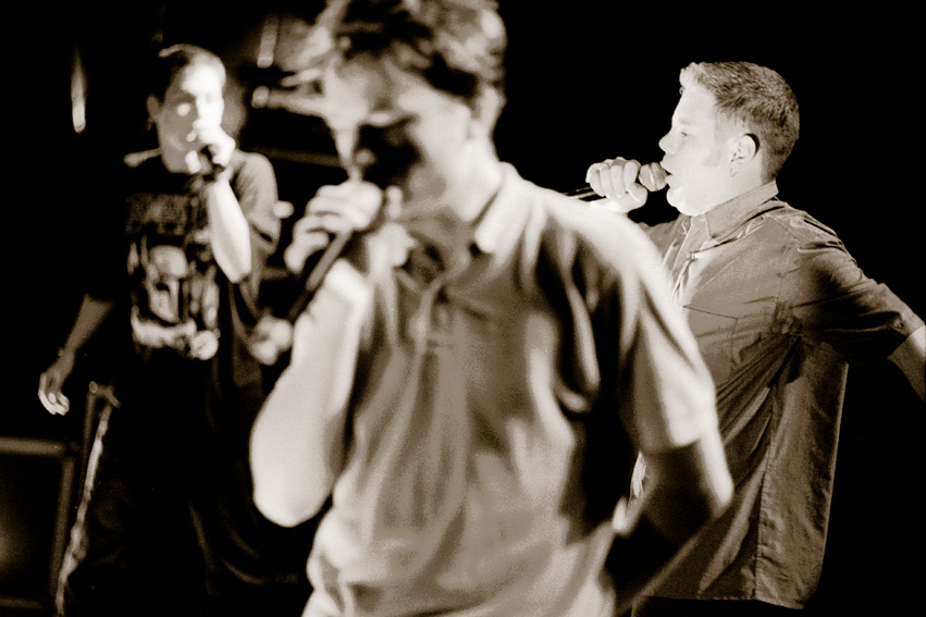 Rap Gruppe Fettes Brot1998 live in Schenefeld